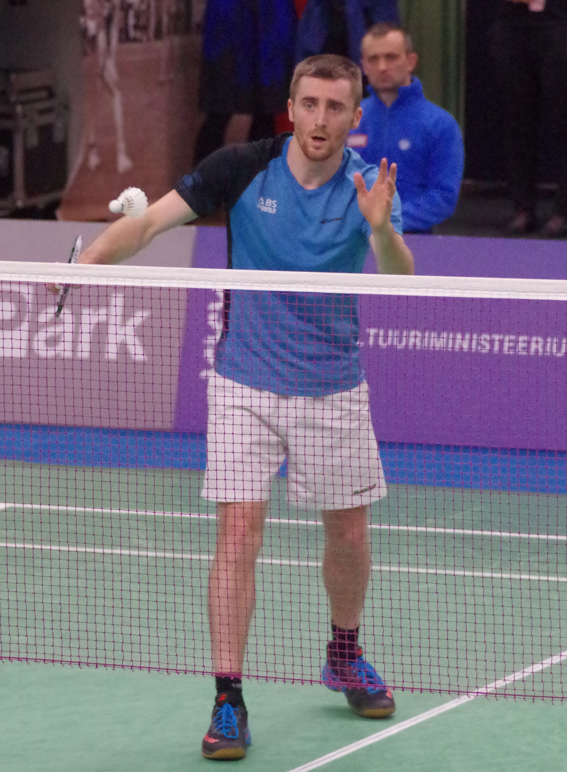 Lucas Claerbout, prantsuse sulgpallur Tallinnas turniiril YONEX Estonian International 2020